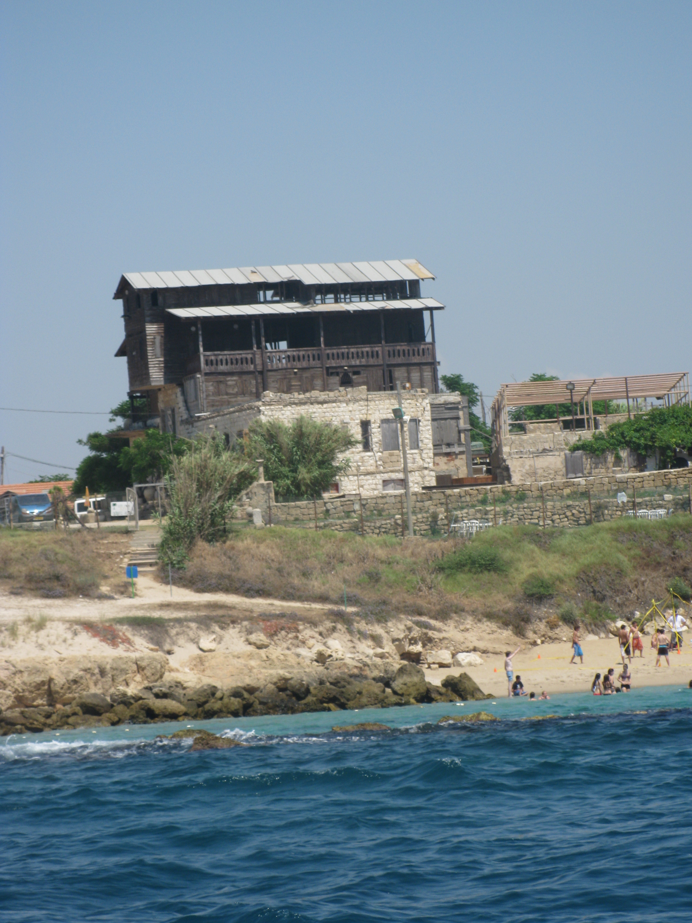 Achziv Beach חוף אכזיב